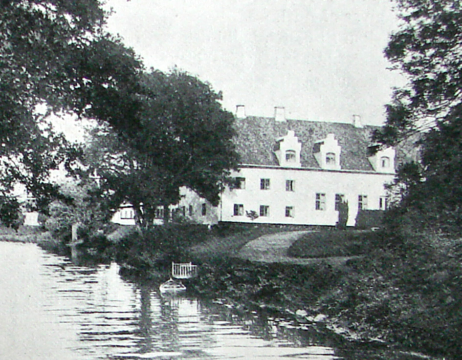 {a: Birkelse er en gammel hovedgård. Birkelses historie går helt tilbage til 1202, da godset var ejet af Vitskøl Kloster. Gården ligger i Aaby Sogn, Kær Herred, Jammerbugt Kommune. Hovedbygningen er opført i 1555-1697, men er ombygget i 1819 efter en brand. Birkelse ligger lige ved bredden af Ryå og ses på billedet.}{en: Birkelse is an old mansion. The history of the place goes back to 1202, when the estate was owned by the convent Vitskøl Kloster. The farm house lies in Åby Sogn in Northern Jutland in Denmark. The main building is built between 1555 and 1697, and rebuilt after a fire in 1819. Birkelse lies by the river Ryå in Denmark seen in the picture}